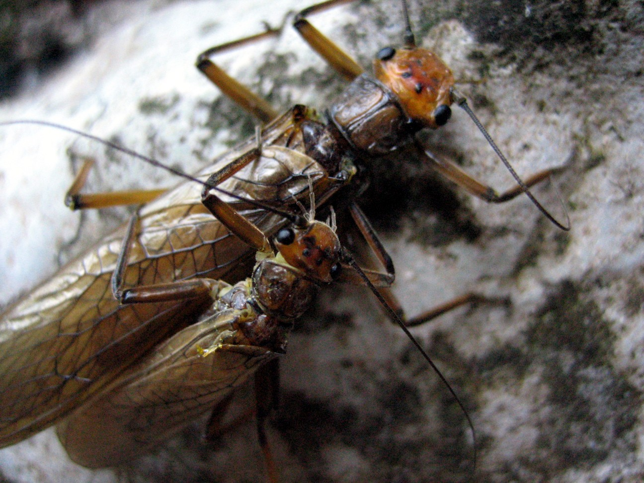 Plecoptera in copula